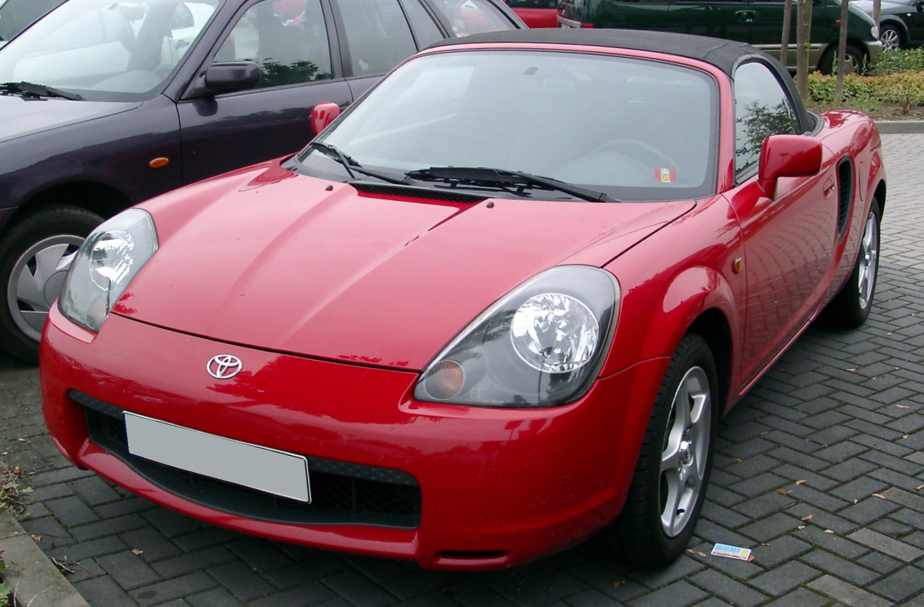 Toyota MR2 W3